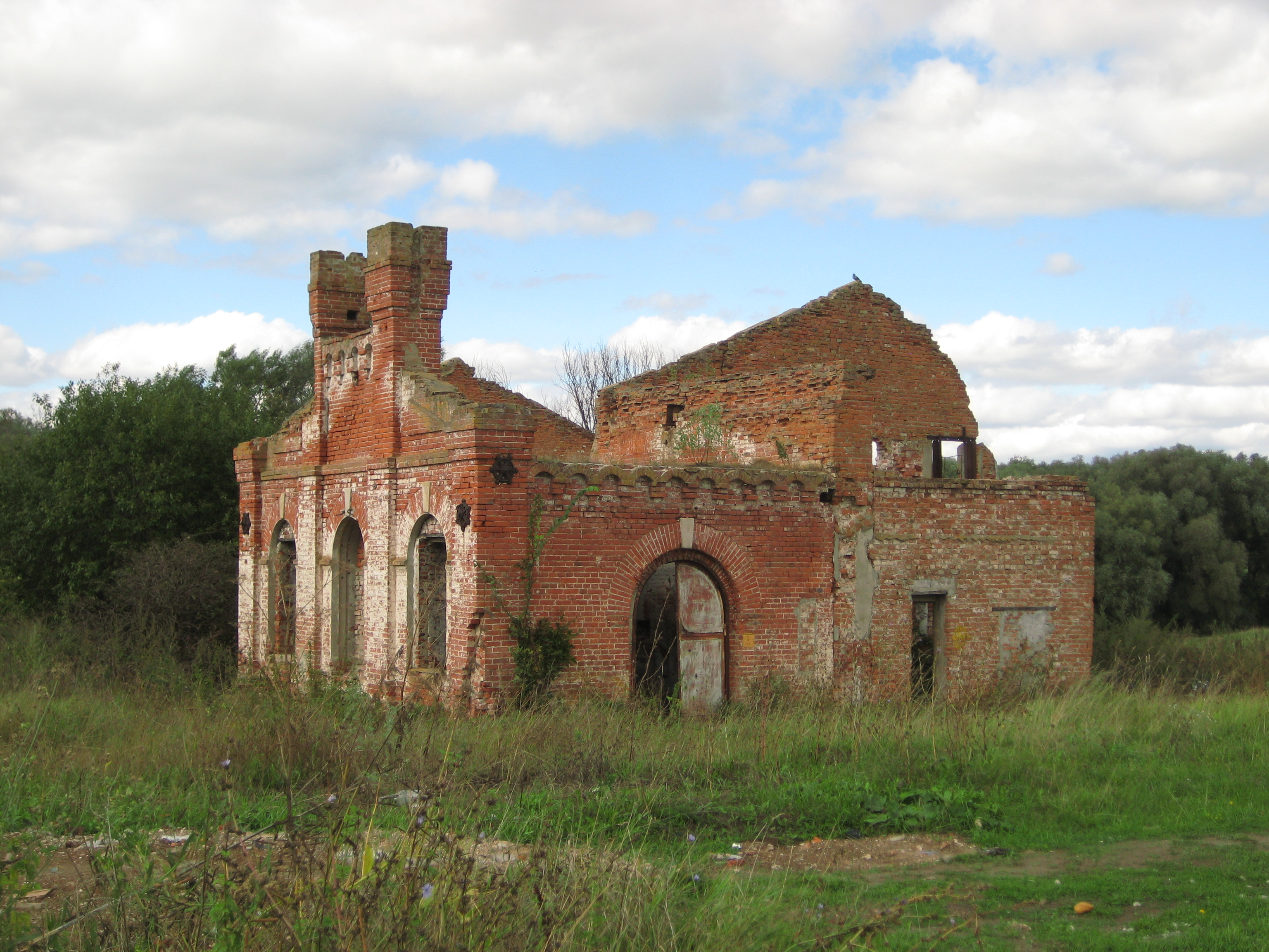 Троицкое, Калужская область. Театр, руины